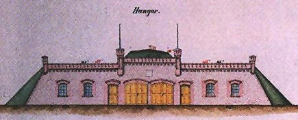 Zeichnung der Fassade des Fort I der Festung Magdeburg